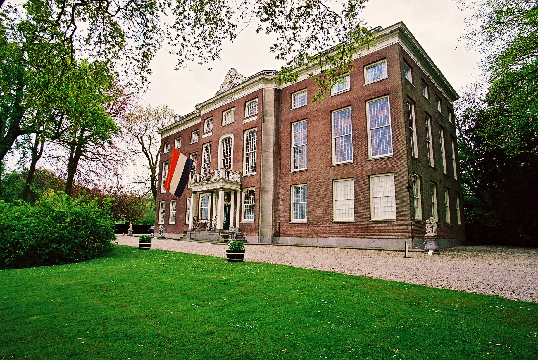 't Huys ten Donck te Ridderkerk.